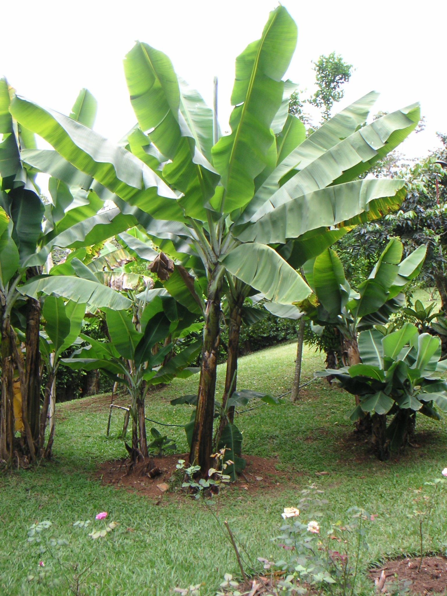 Bananenpflanze in Cali, Kolumbien